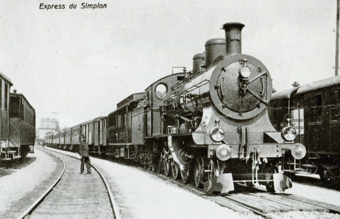 Ansichtskarte mit internationalen Luxuszug Simplon-Express (Paris-Mailand) mit einer Dampflok der SBB. Es handelt sich um die Lokomotive SBB A 3/5 721, die noch von der Juras-Simplon-Bahn vor deren Verstaatlichung bestellt wurde.